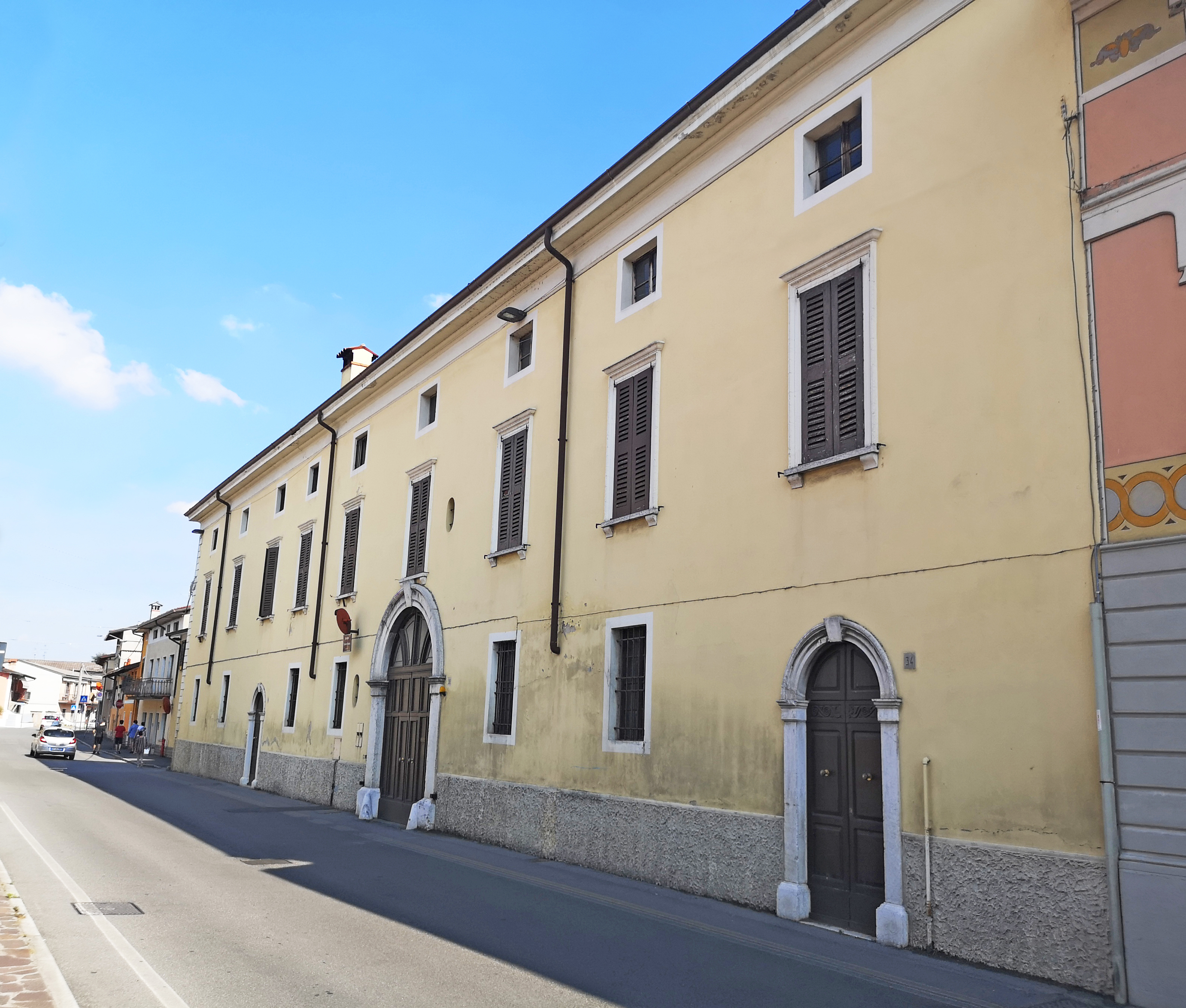 Palazzo Donina in via Marconi, Travagliato